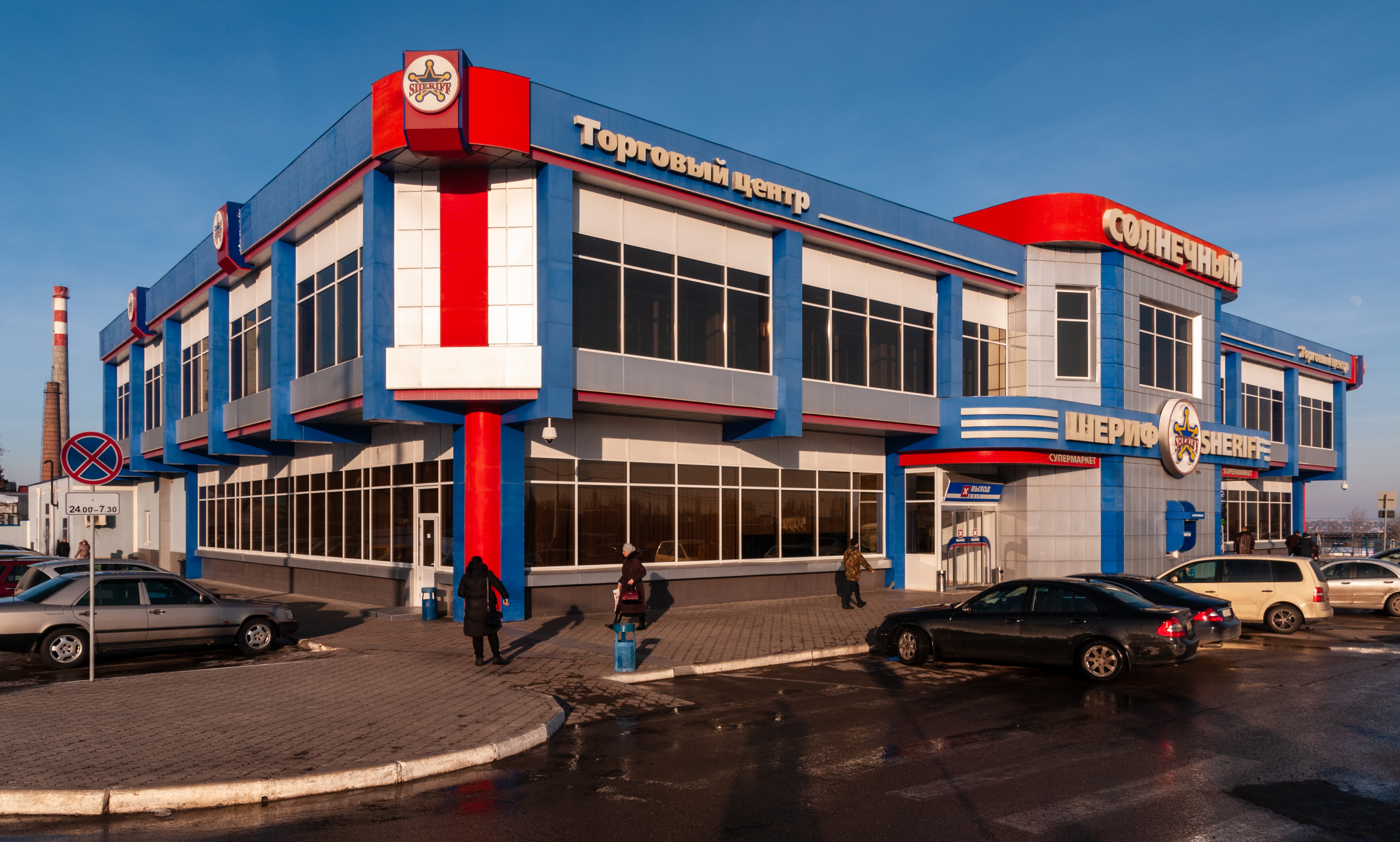 Bender, Pridnestrowien, Sheriff-Supermarkt